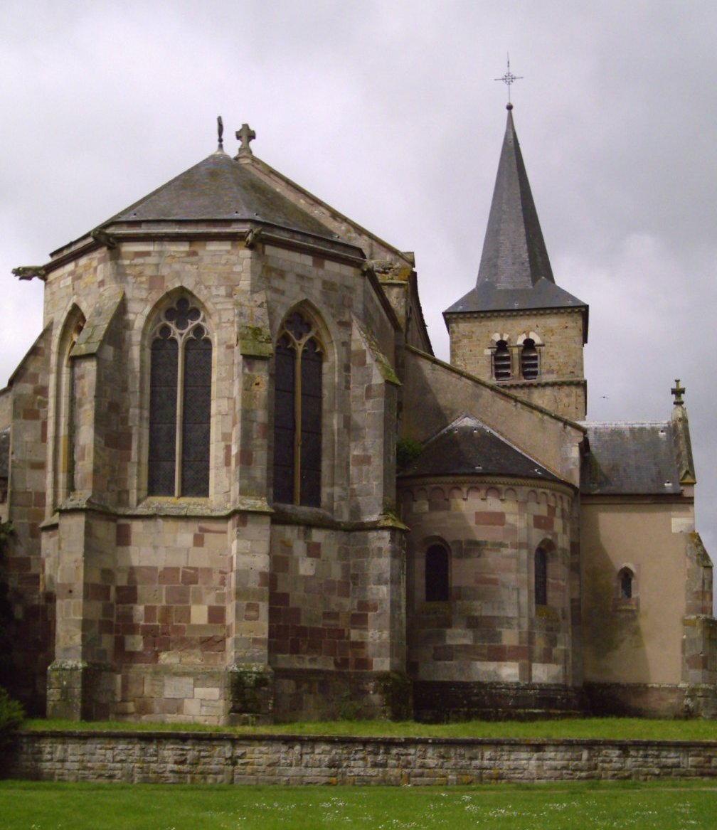 Marsal 57 France 28 mai 2006 Arrière de la collégiale Saint-Léger